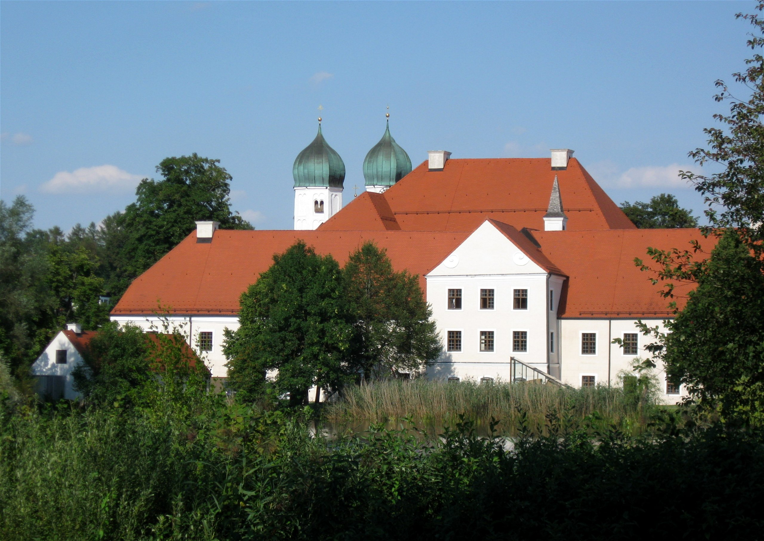 Klosterseeon, Klosterbauten, gruppiert um drei Höfe: Konventbau mit ehemaligem Kreuzgang und Kapitelsaal, mittelalterlich. Ehemaliges Refektorium mit Stuck aus der zweiten Hälfte des 17. Jahrhunderts. Ehemaliger Speisesaal in der Prälatur, jetzige Gestalt von 1755-58; mit historischer Ausstattung. Marien- oder Laimingerkapelle; mit Ausstattung; darüber liegend Winterchor. Nikolaikapelle (Prälaturkapelle), barock, zweite Hälfte 18. Jahrhundert; mit Ausstattung.